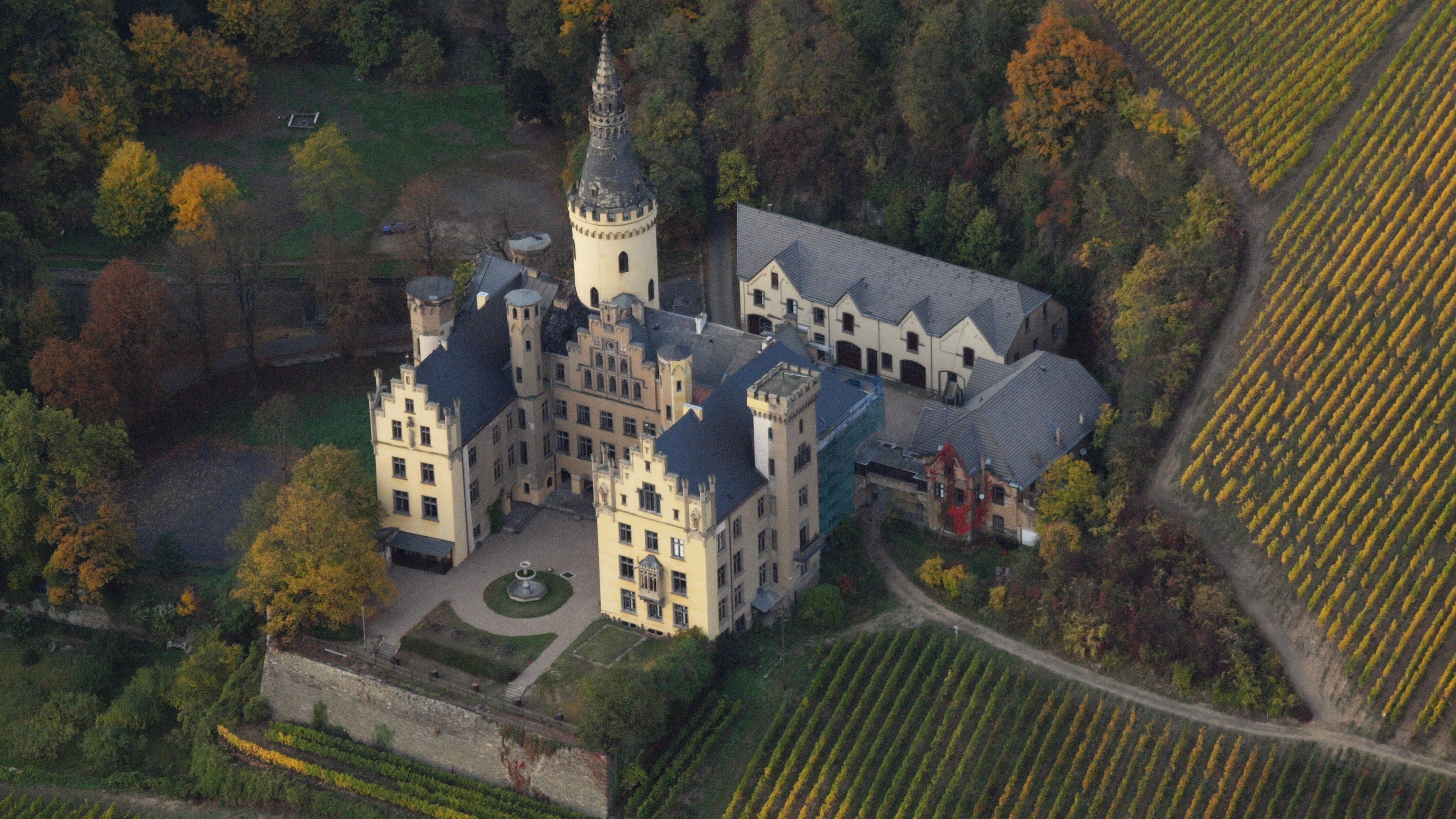 Schloss Arenfels: Luftaufnahme